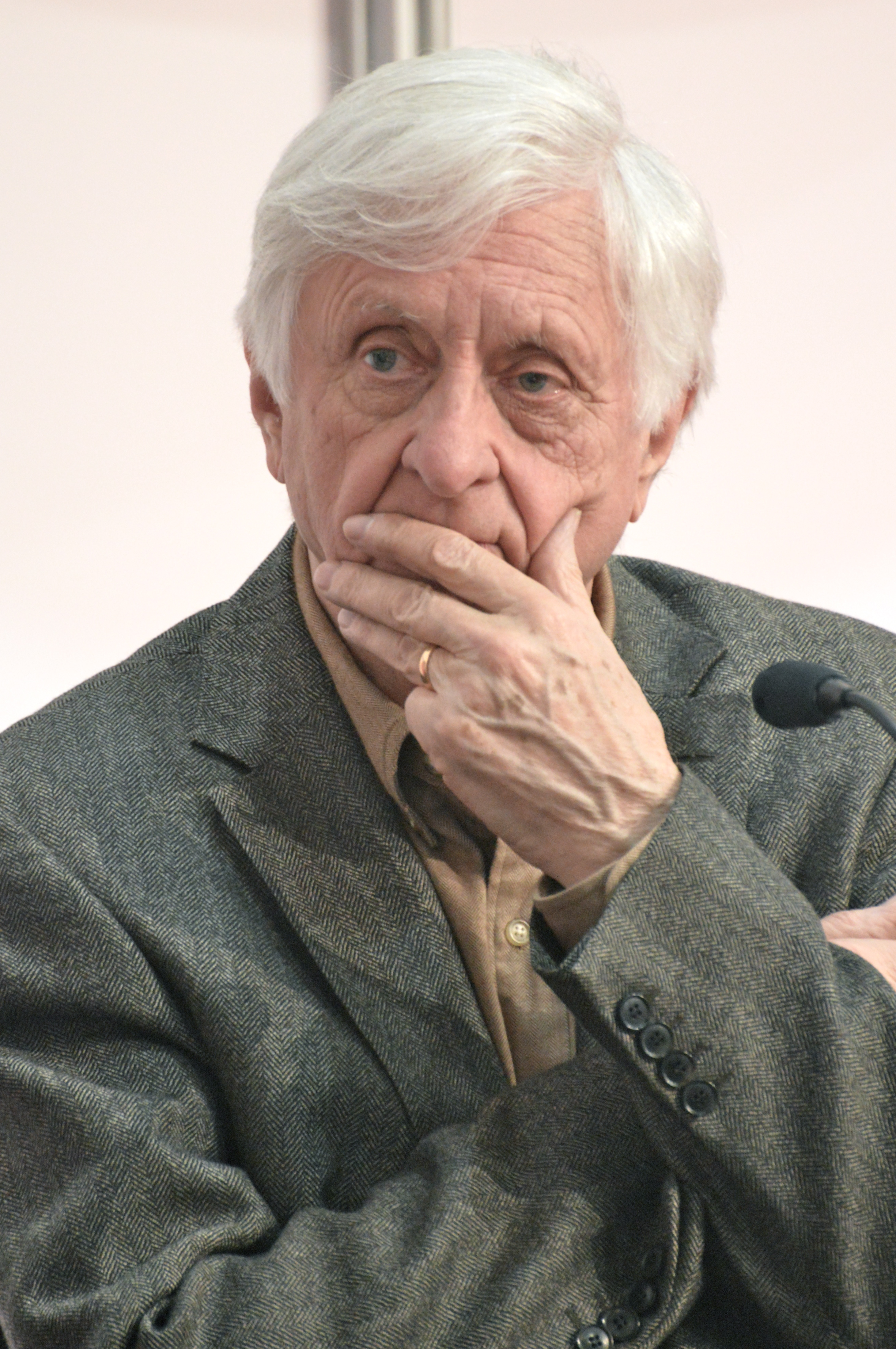 Jacques Godbout au Salon international du livre de Québec 2014